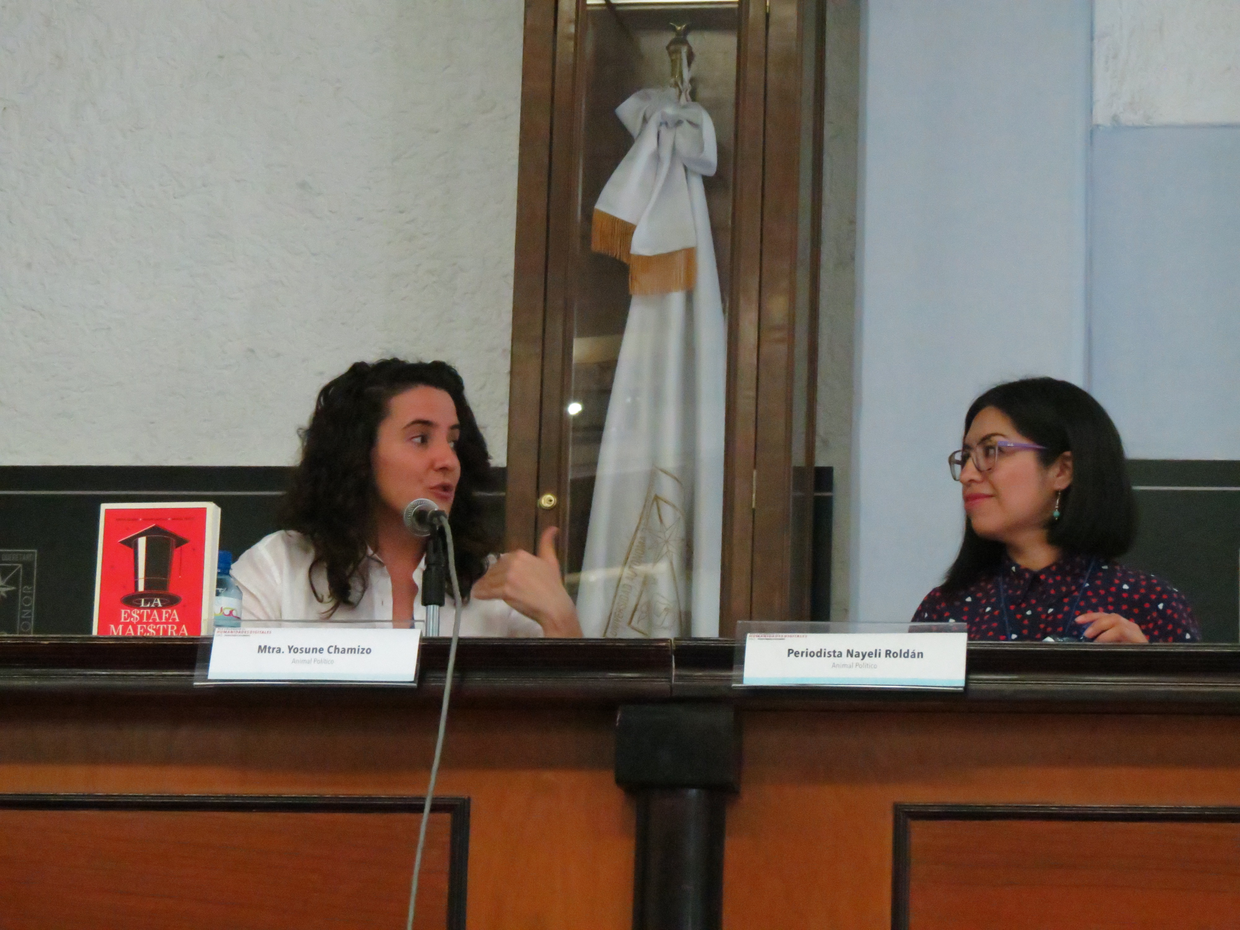 Nayeli Roldán y Yosume Chamizo (Animal Político) hablando sobre La estafa maestra en la Universidad Autónoma de Querétaro, durante el 1er Coloquio de Humanidades Digitales #1CHD Auditorio Fernando Díaz Ramírez